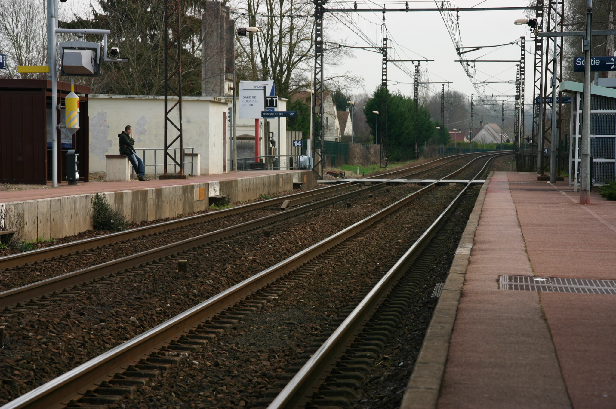 La gare de Boissise-le-Roi, Boissise-le-Roi, département de la Seine-et-Marne (France)